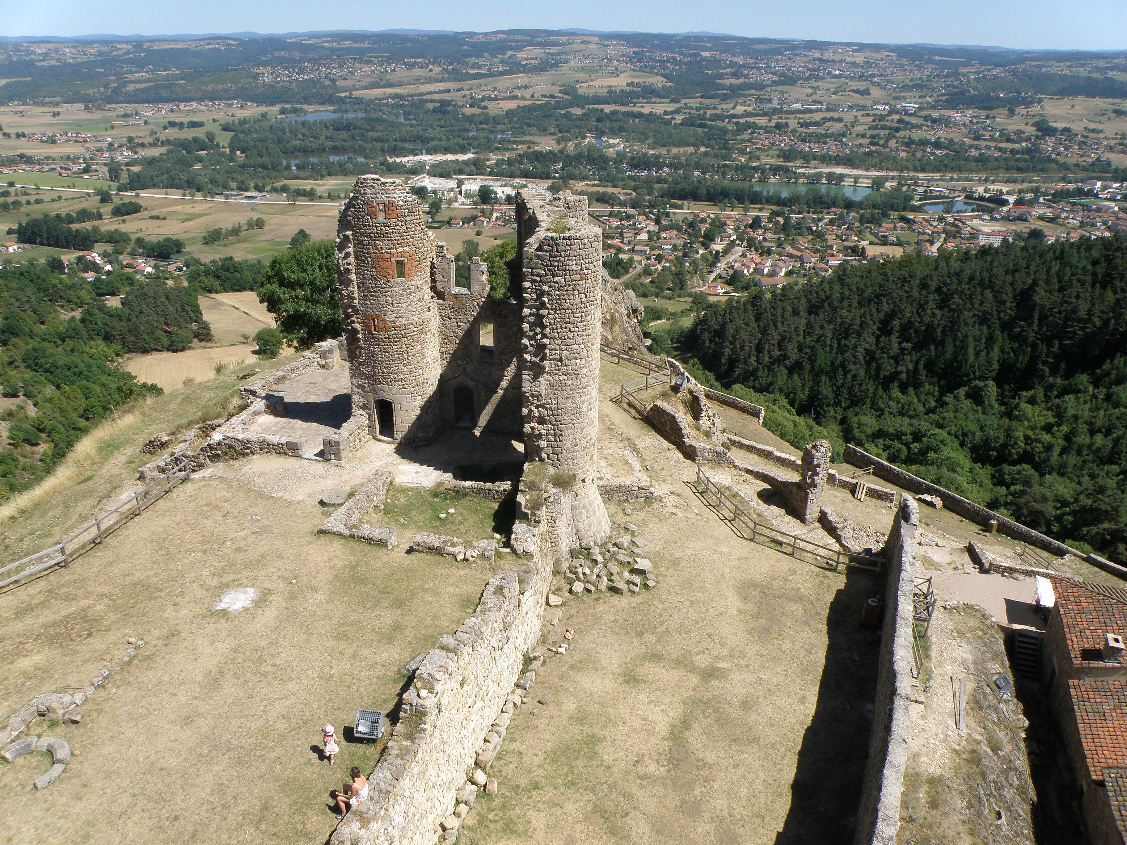 Château de Rochebaron, sis dans la commune de Bas-en-Basset, dép. de la Haute-Loire, France (région Auvergne). La forteresse vue du sommet de la grande tour ronde. Coup d'oeil vers l'est-sud-est. Au centre de la photo, le dénommé complexe porterie/chapelle, comprenant, à droite, une des deux tourelles du portail d'entrée, et au milieu, la façade occidentale de la chapelle. La tour triangulaire (non visible ici) et le complexe porterie/chapelle font partie du noyau central de la forteresse ; la muraille située au centre de la photo, faisant un angle de 30° avec le bord inférieur, et sur laquelle est assise une dame, constitue le flanc méridional dudit noyau castral. La muraille plus à droite est la partie sud de la muraille d'enceinte entourant le château proprement dit, et se trouve reliée à la tour ronde, point d'observation du photographe. Le terre-plein au centre, entre le noyau central et la muraille d'enceinte, se situe à 5 m. en contrebas du noyau central. Tout à fait à droite : la basse-cour au sud du château propement dit, avec la toiture de la ferme d'accueil.